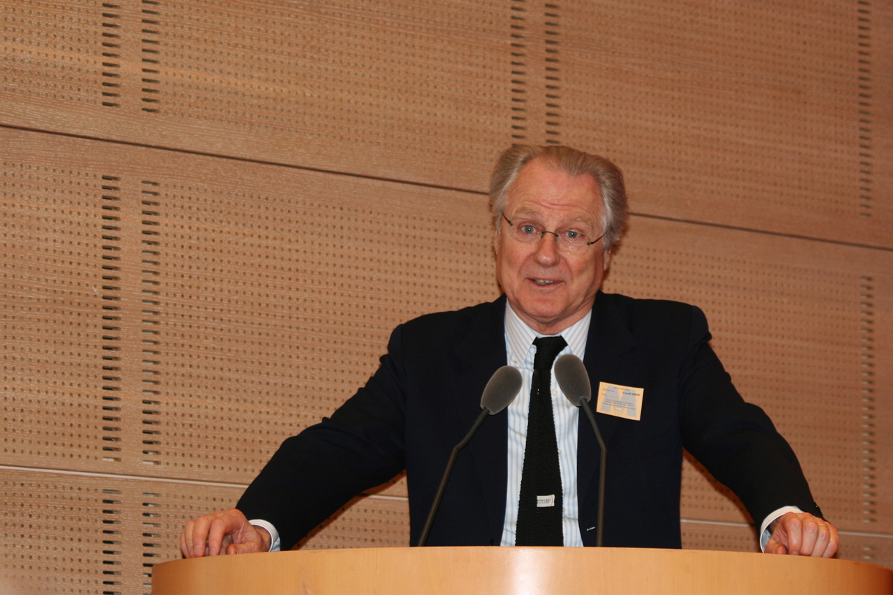 Eric de Rothschild lors d'une reunion de commémoration du 1er anniversaire de la mort d'André Wormser au palais du Luxembourg le 3 avril 2009.